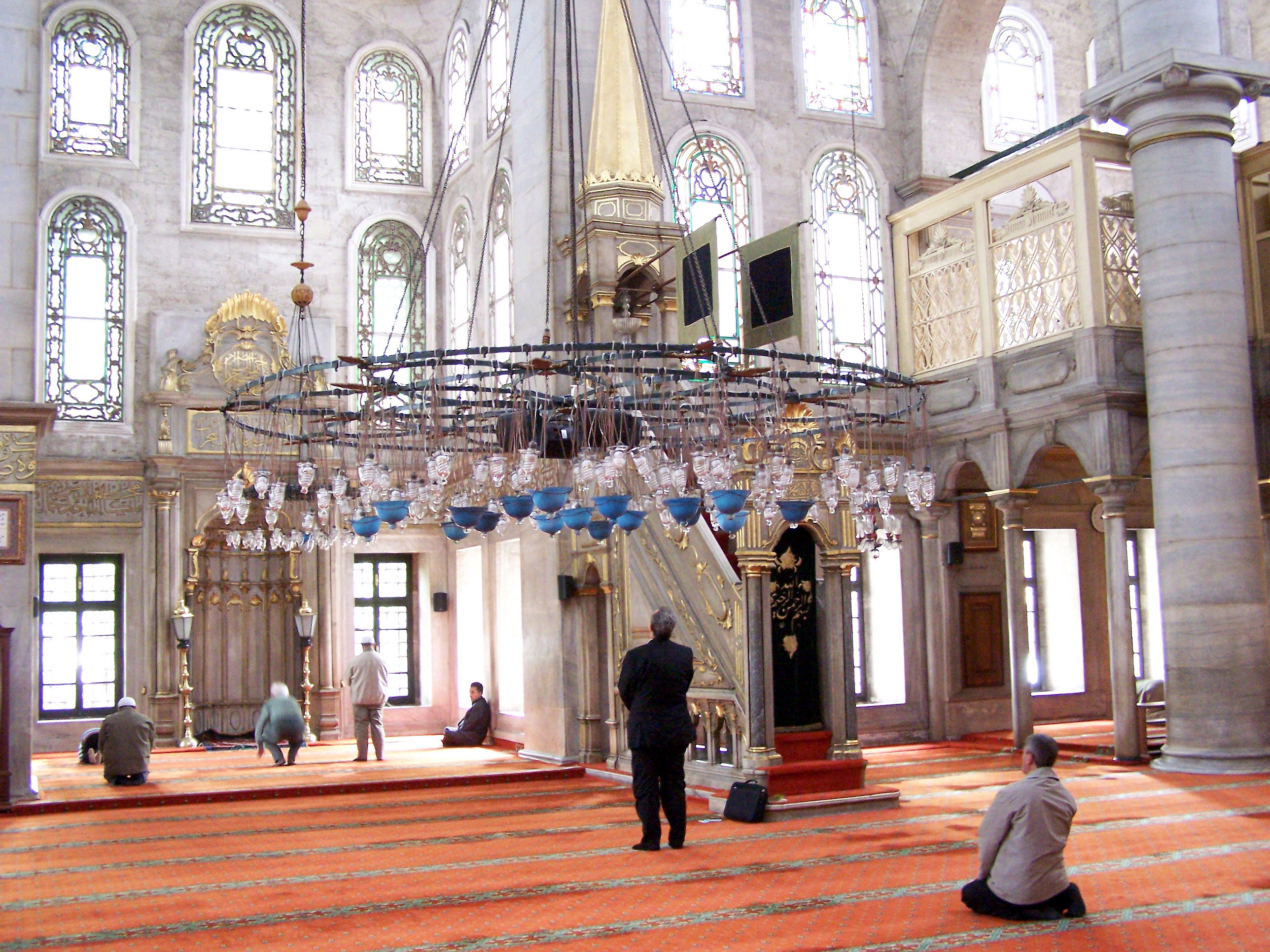 Interior of Eyüp Sultan Camii in Eyüp